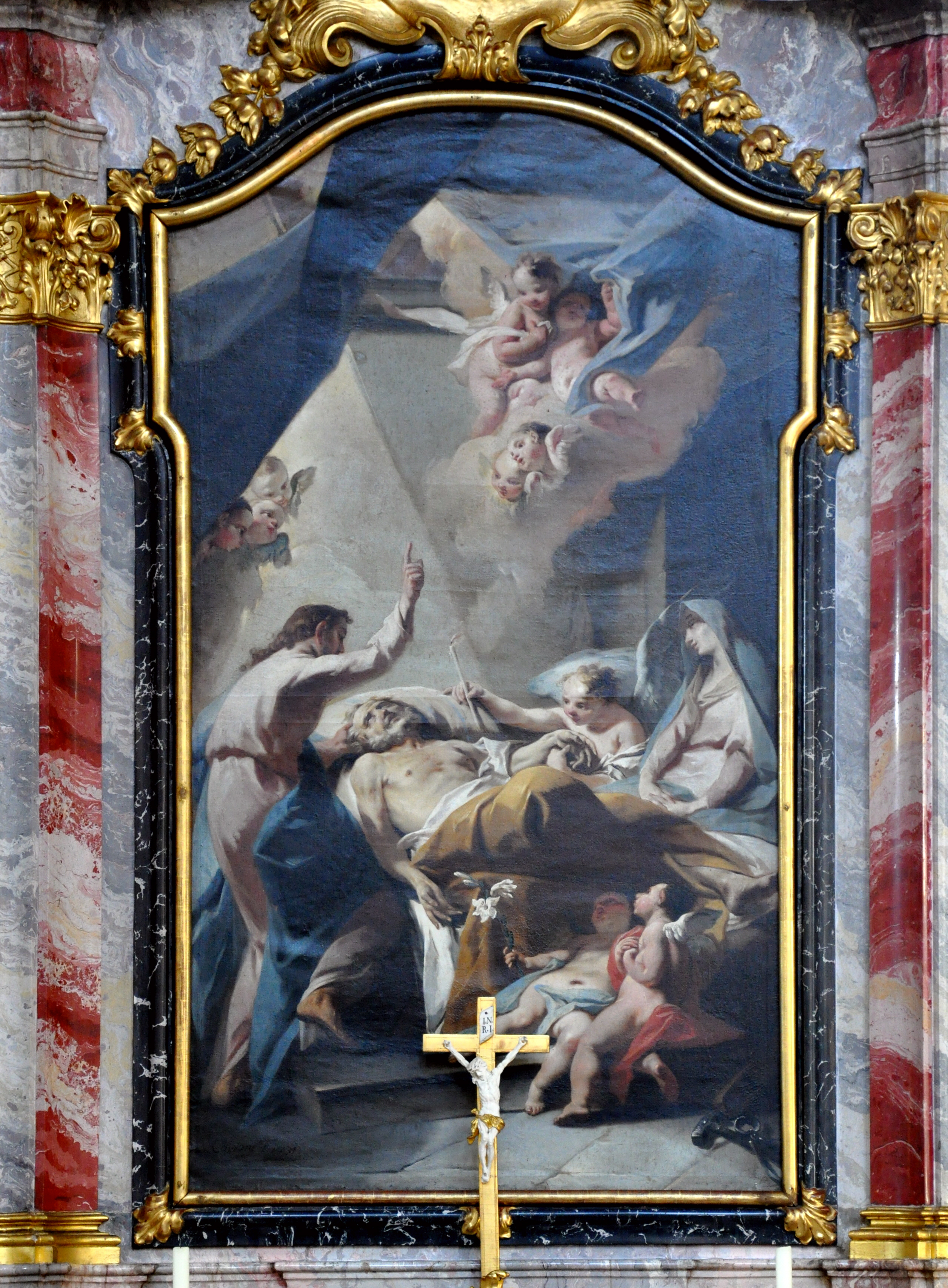 Weingarten (Württemberg) , Basilika St. Martin und Oswald, Heiligenaltäre in den Seitenschiffen von Franz Schmuzer nach Entwurf von Donato Giuseppe Frisoni, mit Putten von Diego Francesco Carlone Josefsaltar, Altarblatt „Tod des hl. Joseph“ von Carlo Innocenzo Carlone, 1731